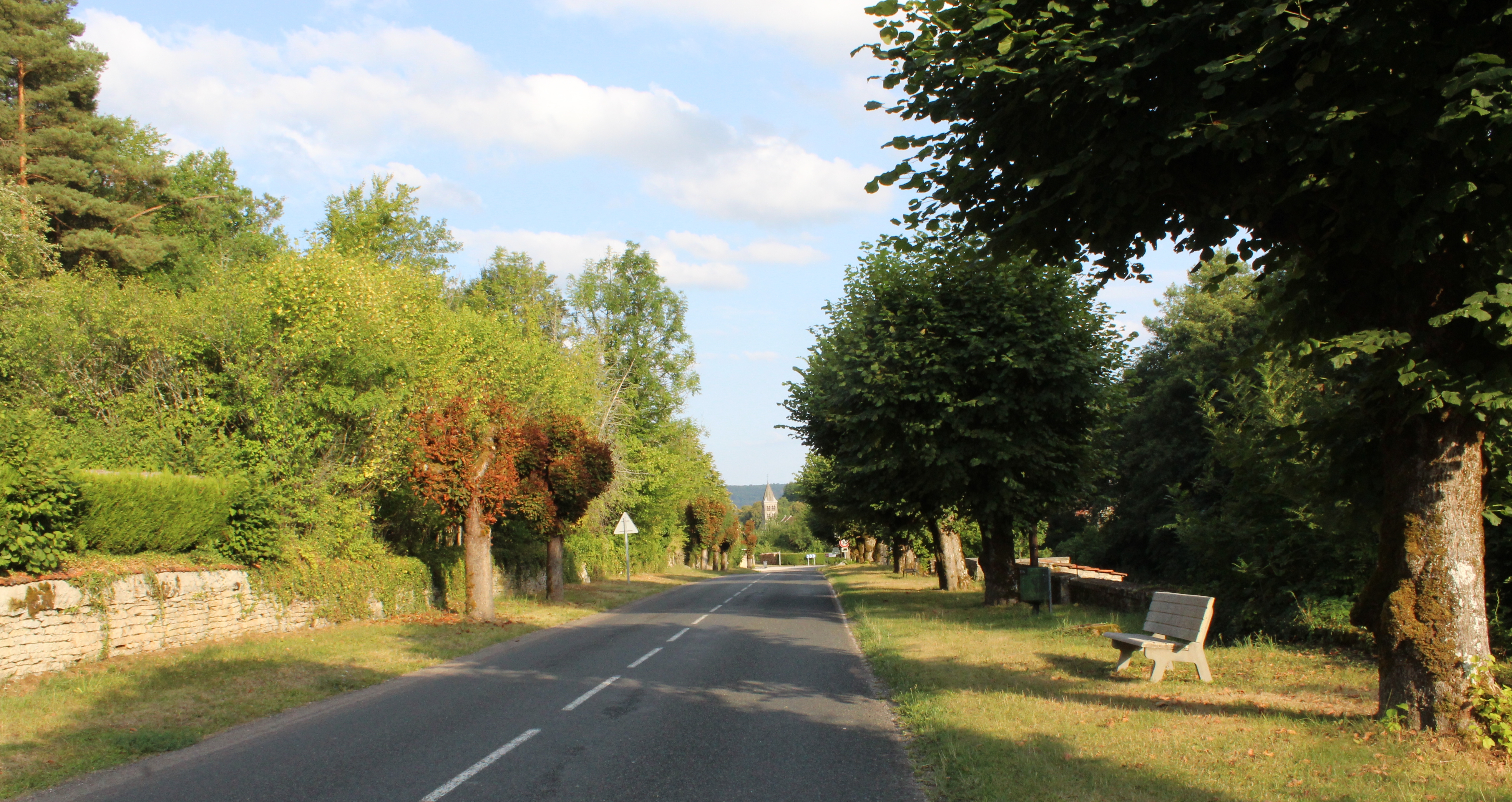 Panorama du village.